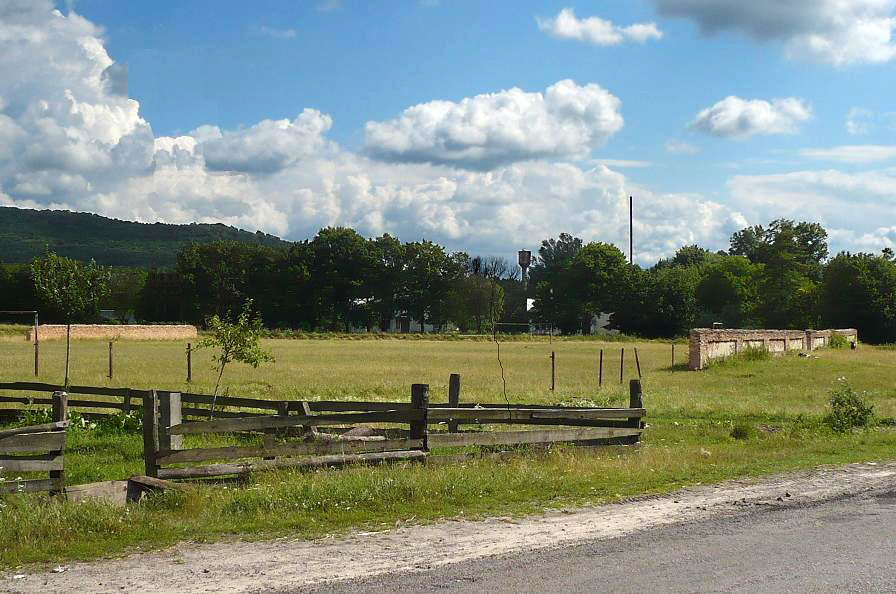 Biały Kamień, zamek